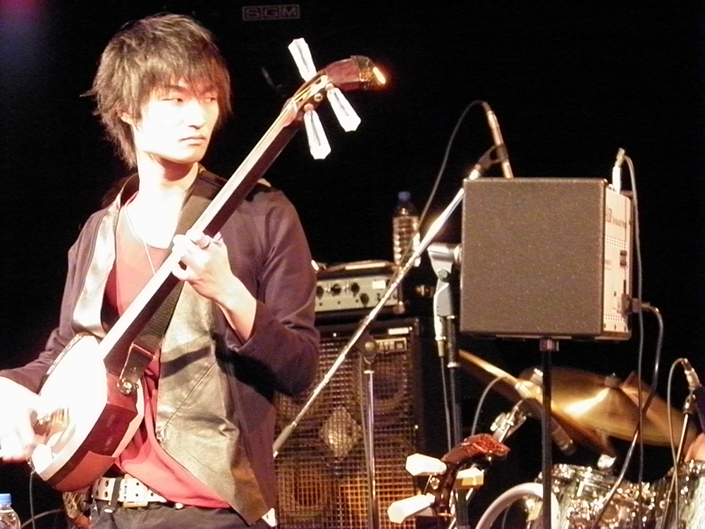 アルバムVerdancy発売記念ライブにて